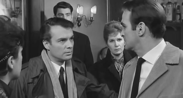 Screenshot del film Eva di Joseph Losey, 1962